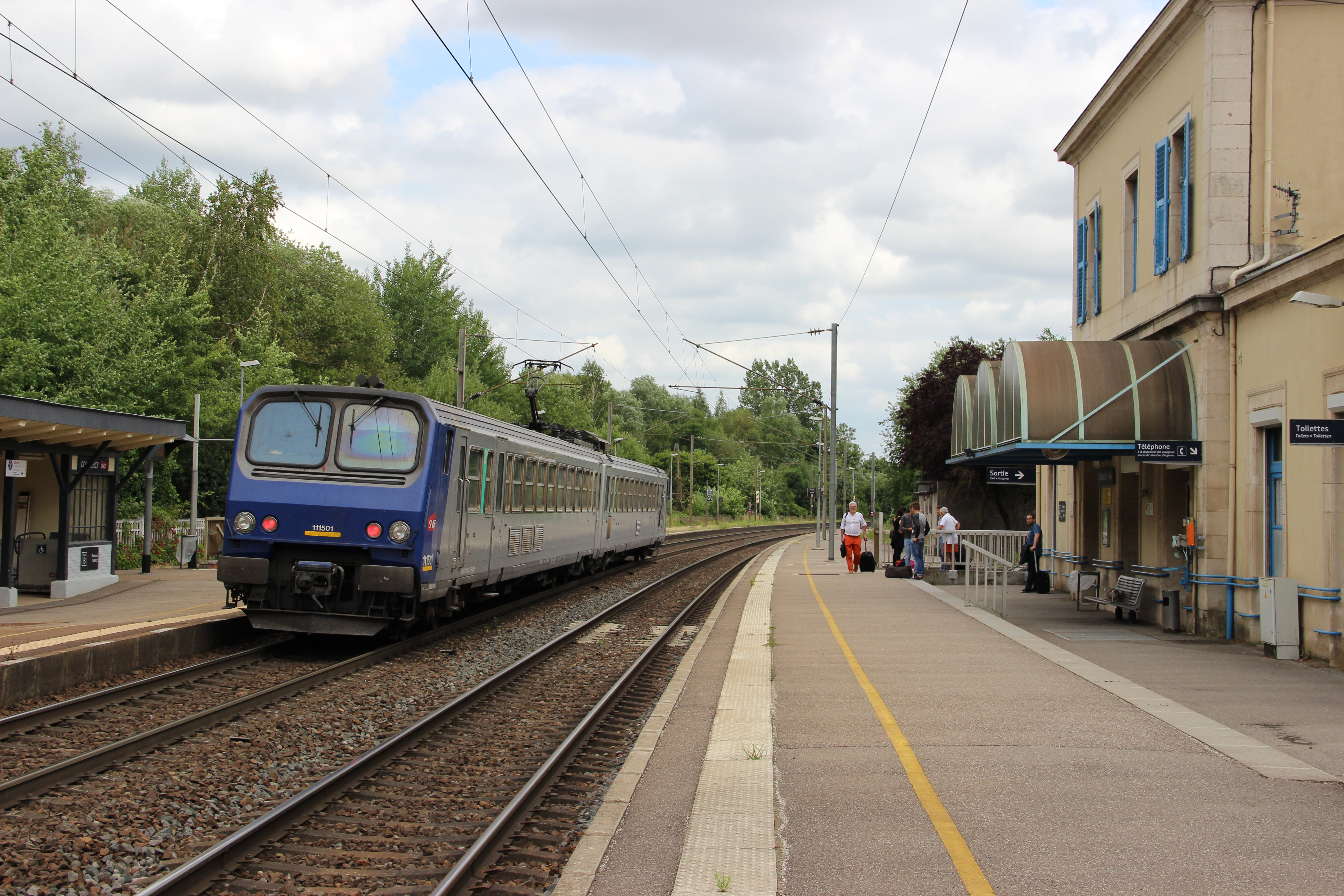 Un TER Lorraine à destination de Nancy en gare de Commercy